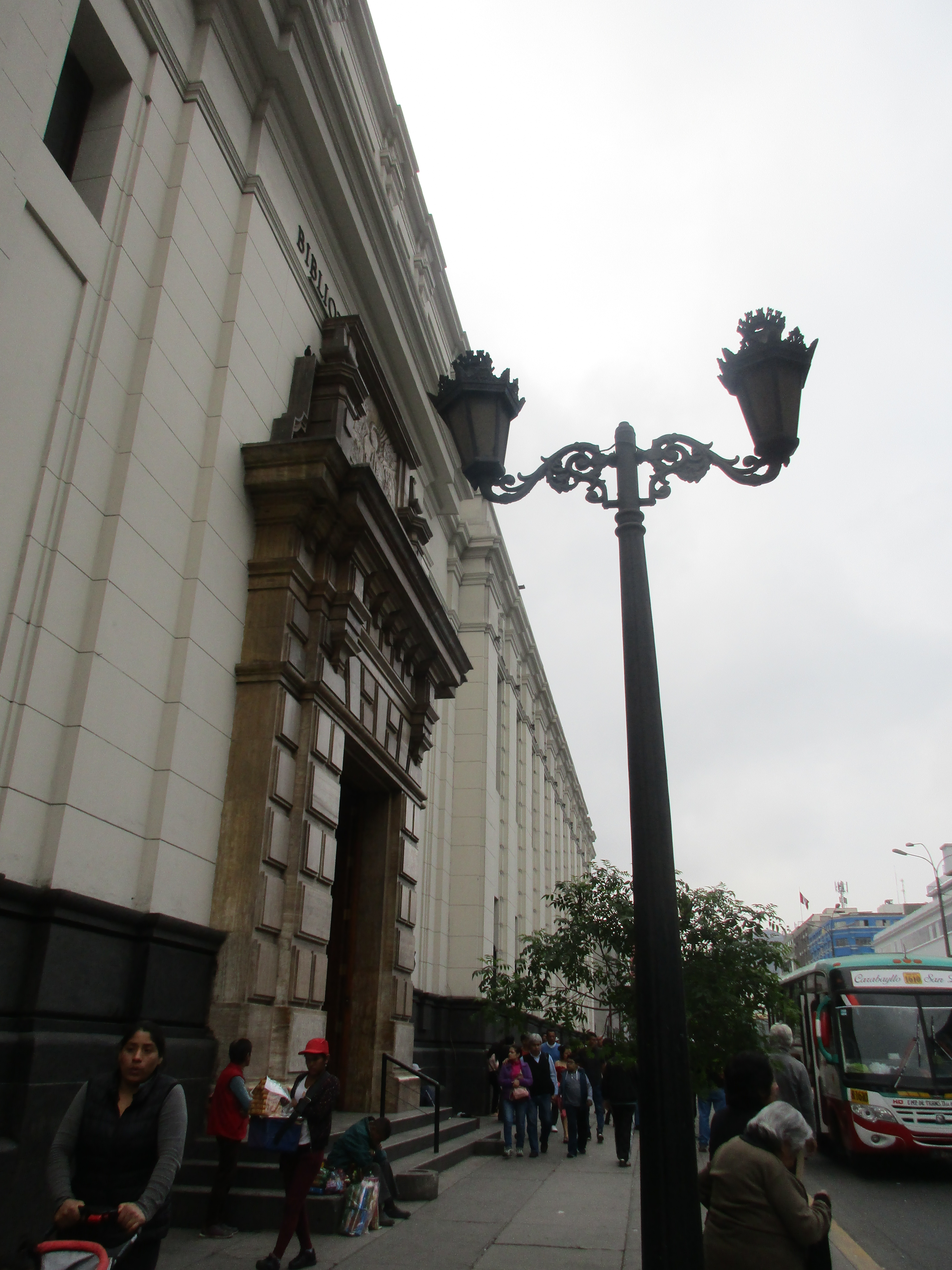 Sede original de la Biblioteca Nacional del Perú en la avenida Abancay, Lima.